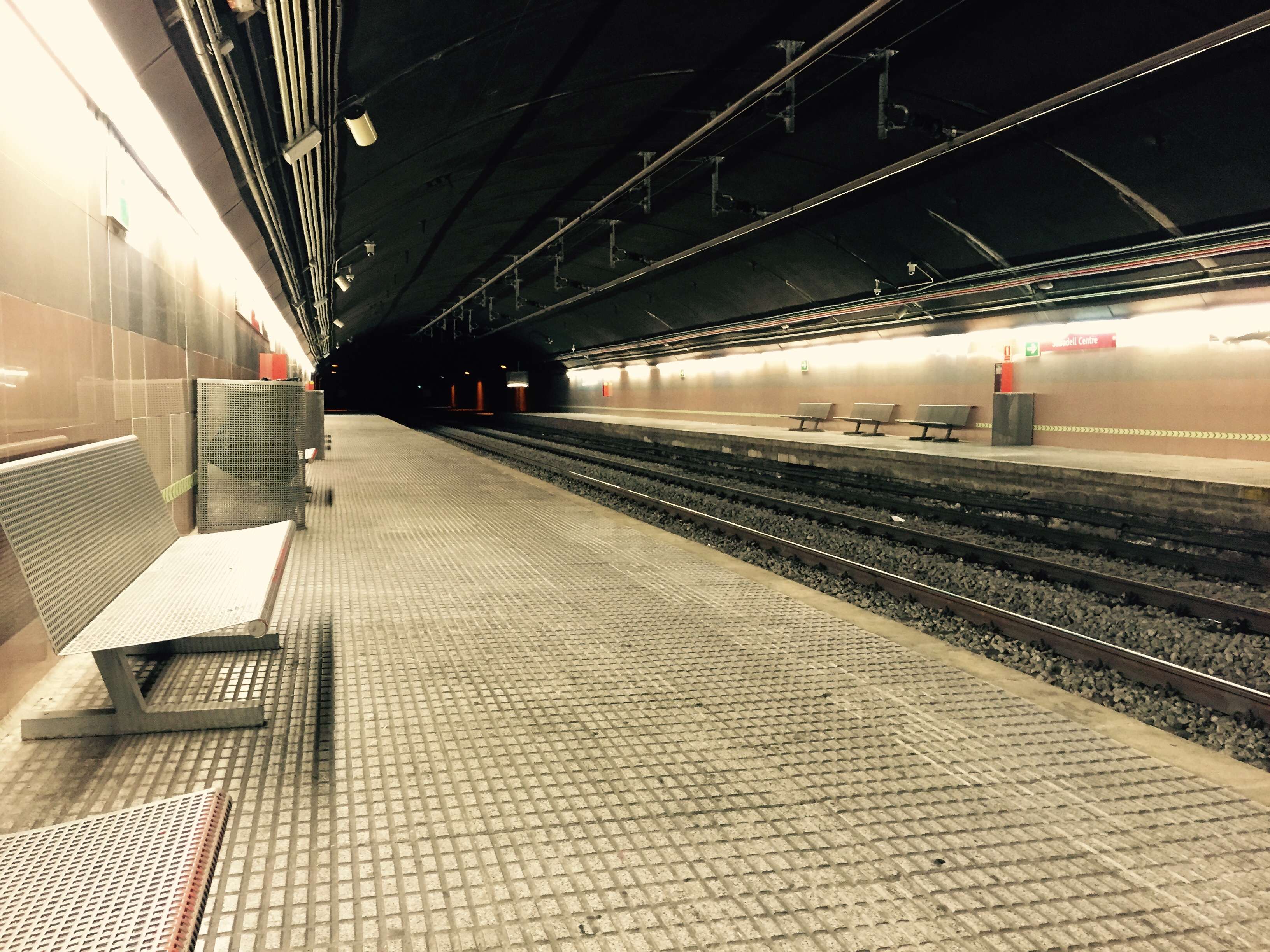 Sabadell centre Renfe 2015